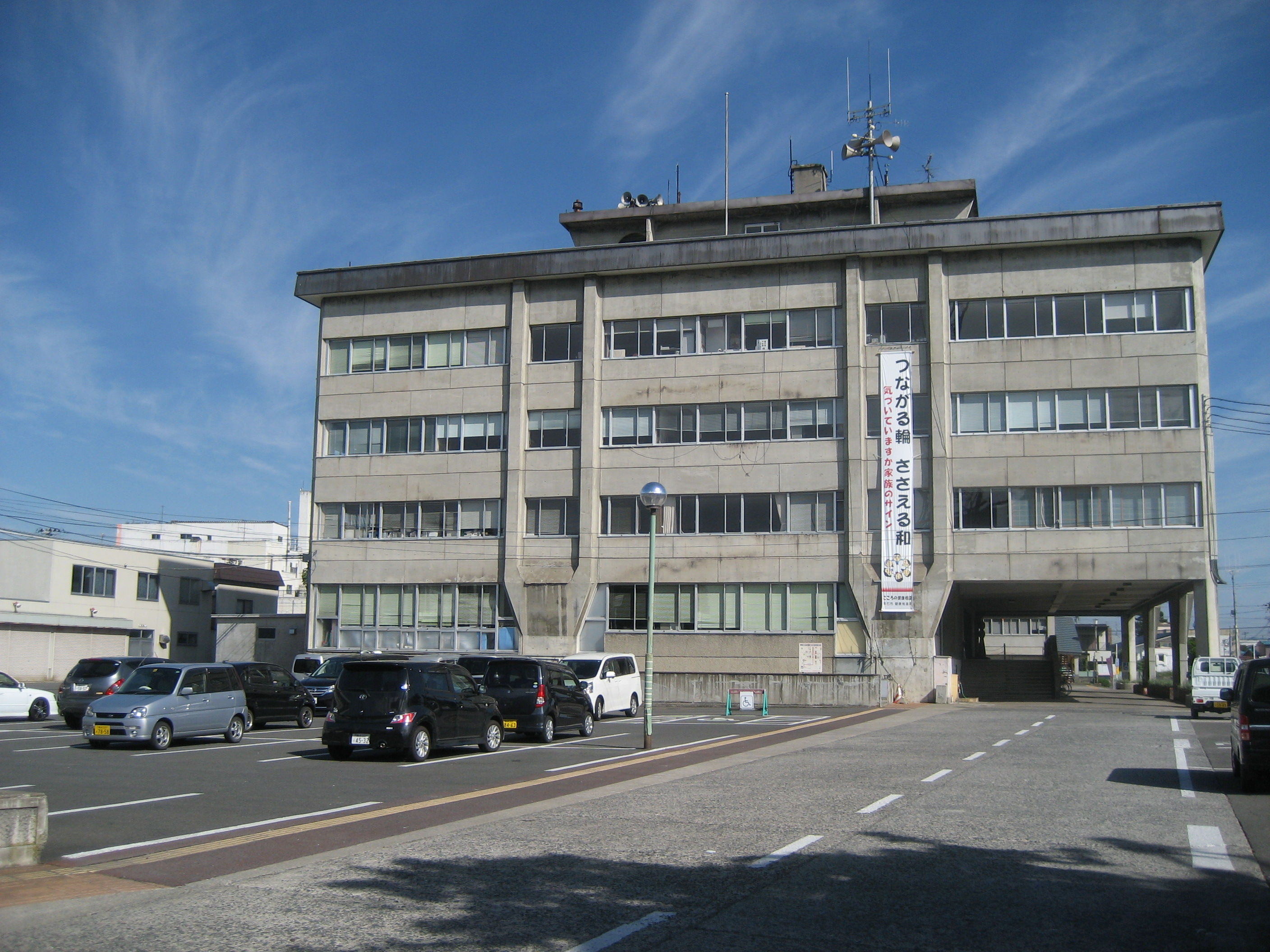 黒石市役所庁舎